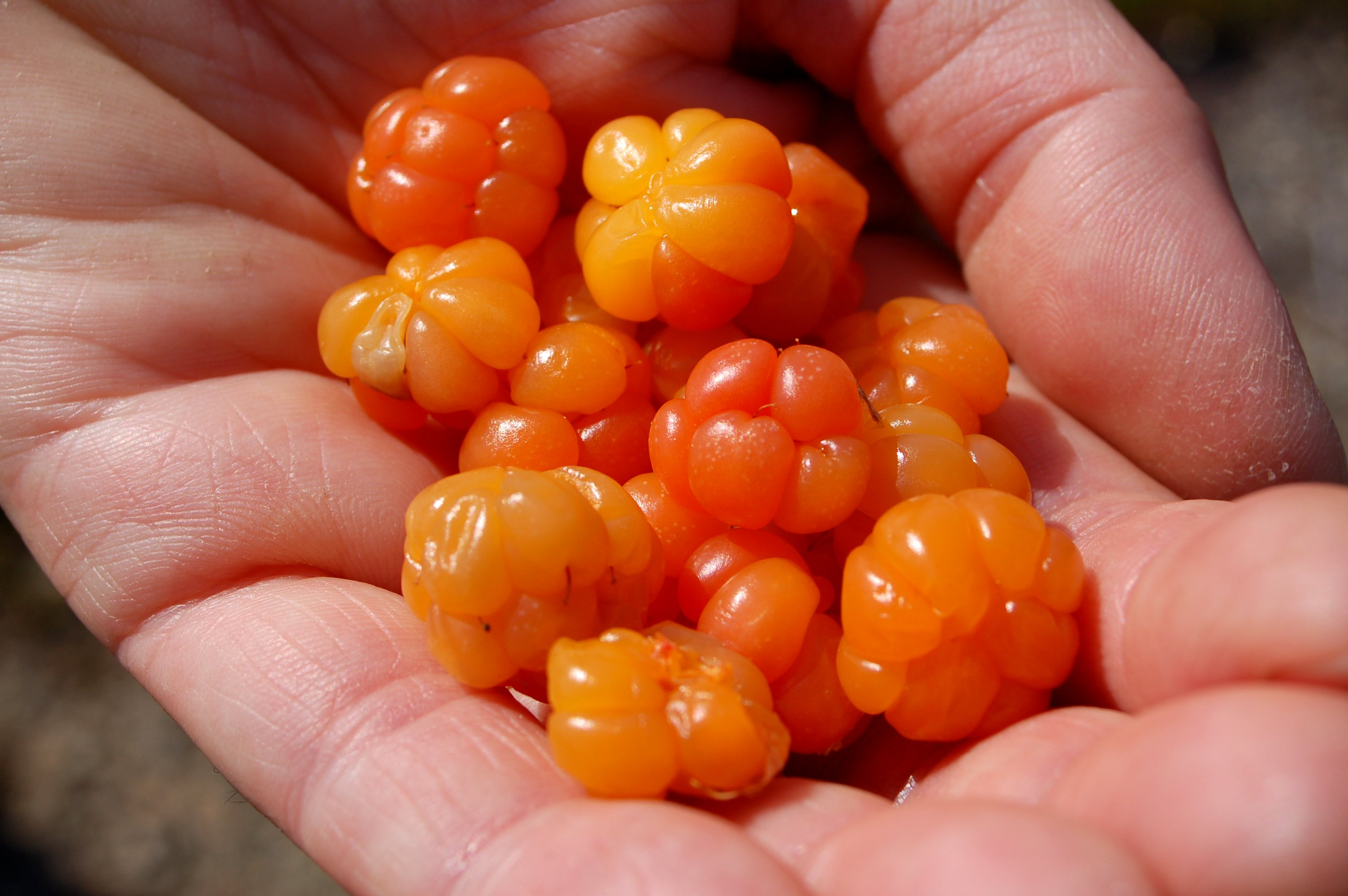 eine Hand reifer Moltebeeren